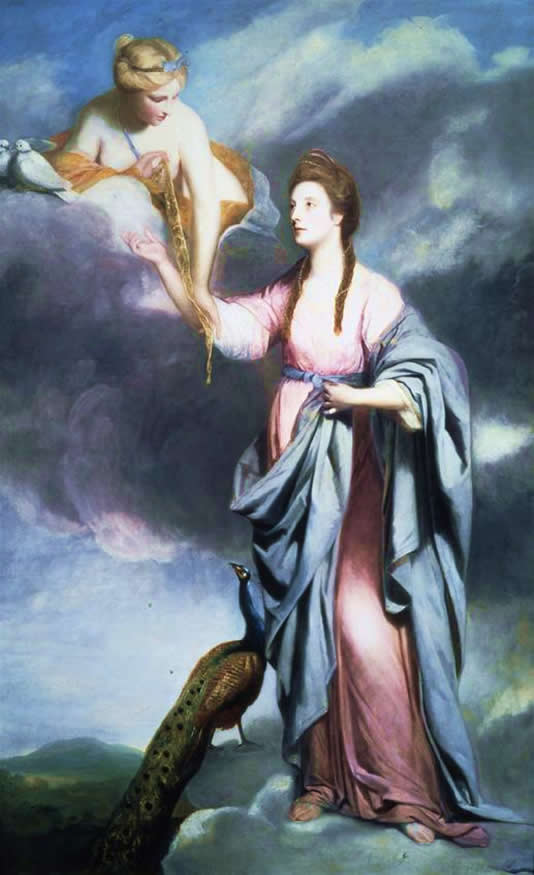 ? × ? cm